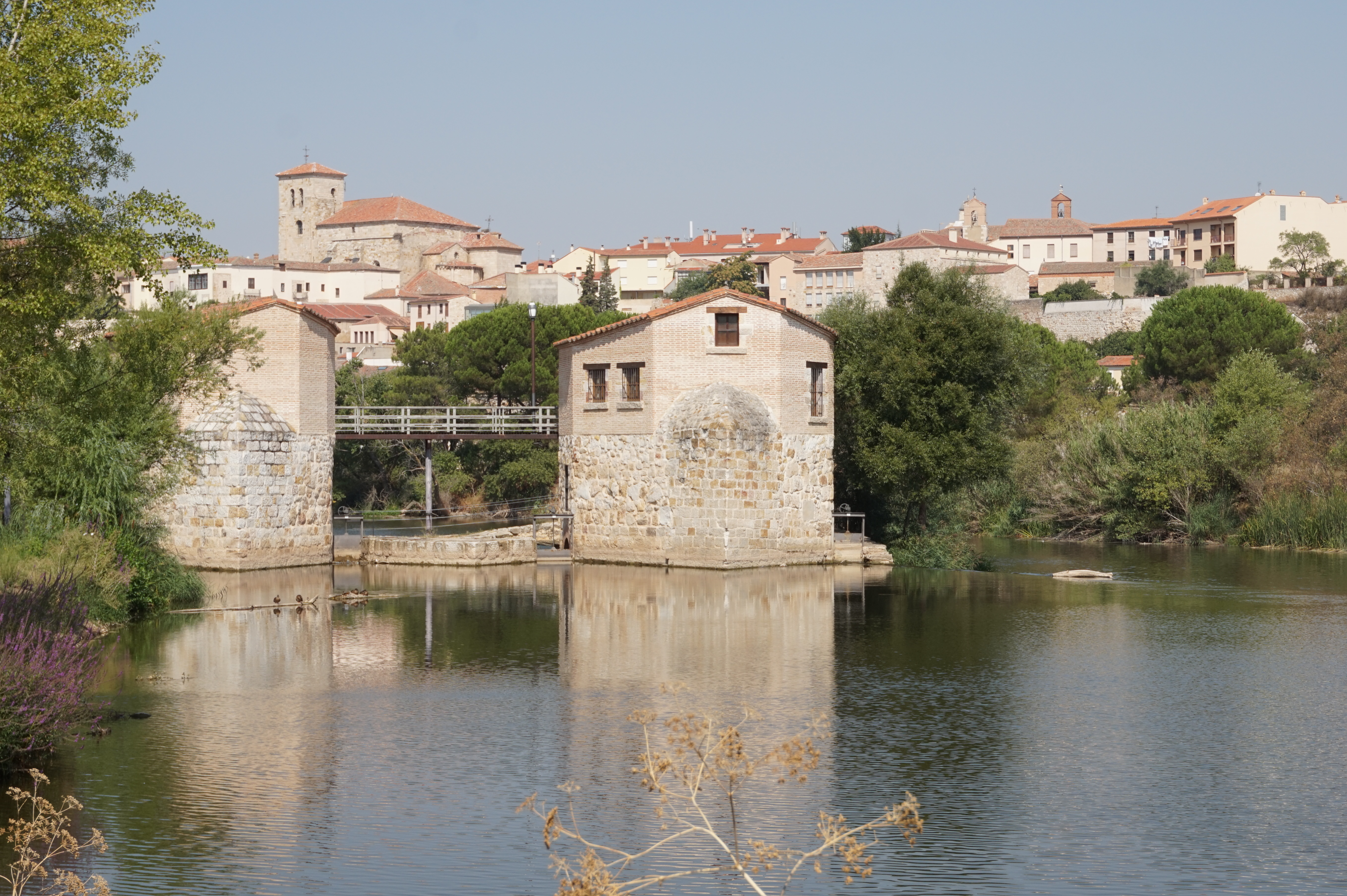 Aceñas de Cabañales - 2015